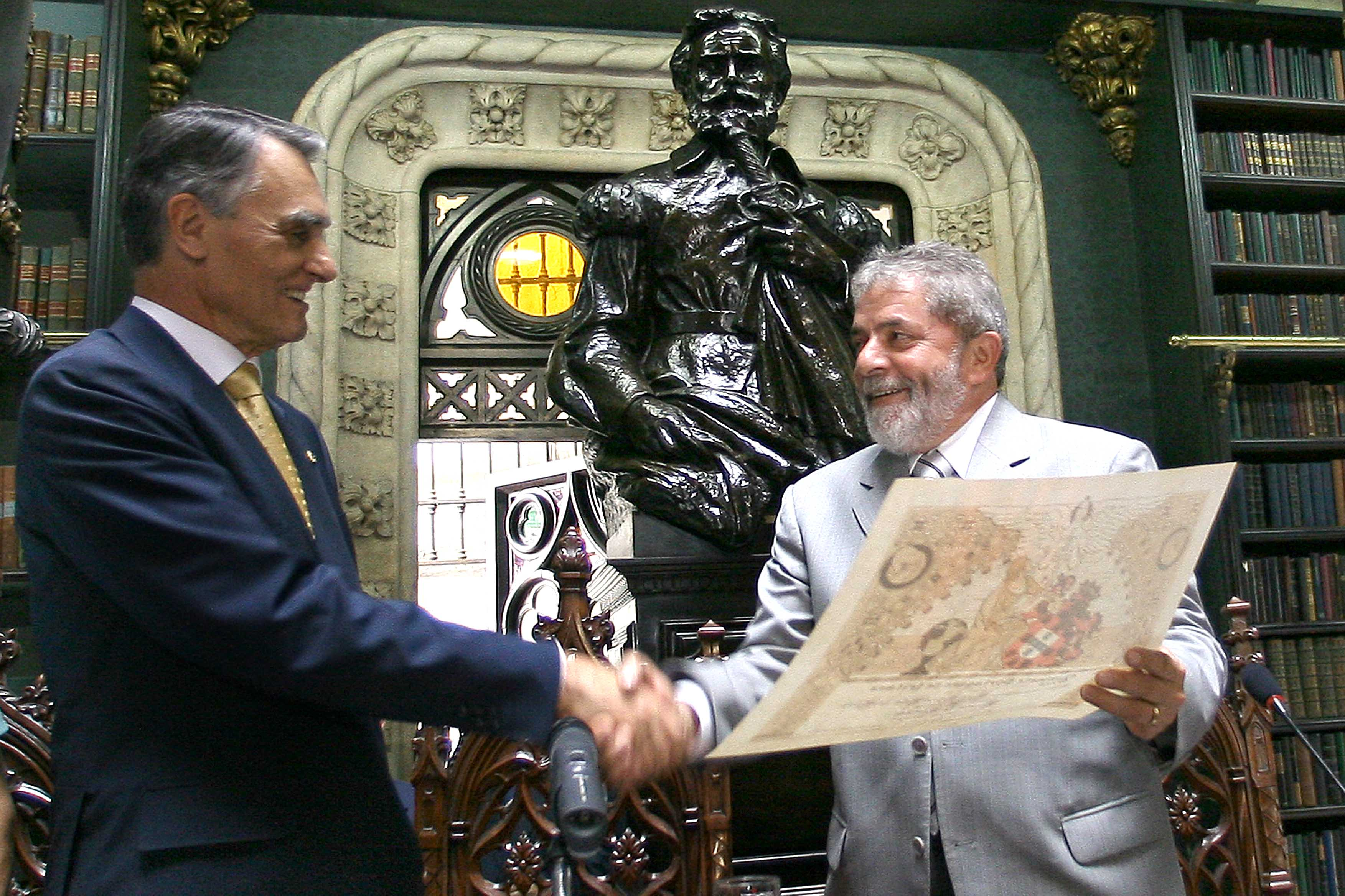 O presidente Lula é cumprimentado pelo presidente de Portugal, Aníbal Cavaco Silva, ao receber o Laurel de Gratidão, durante visita ao Real Gabinete Português de Leitura